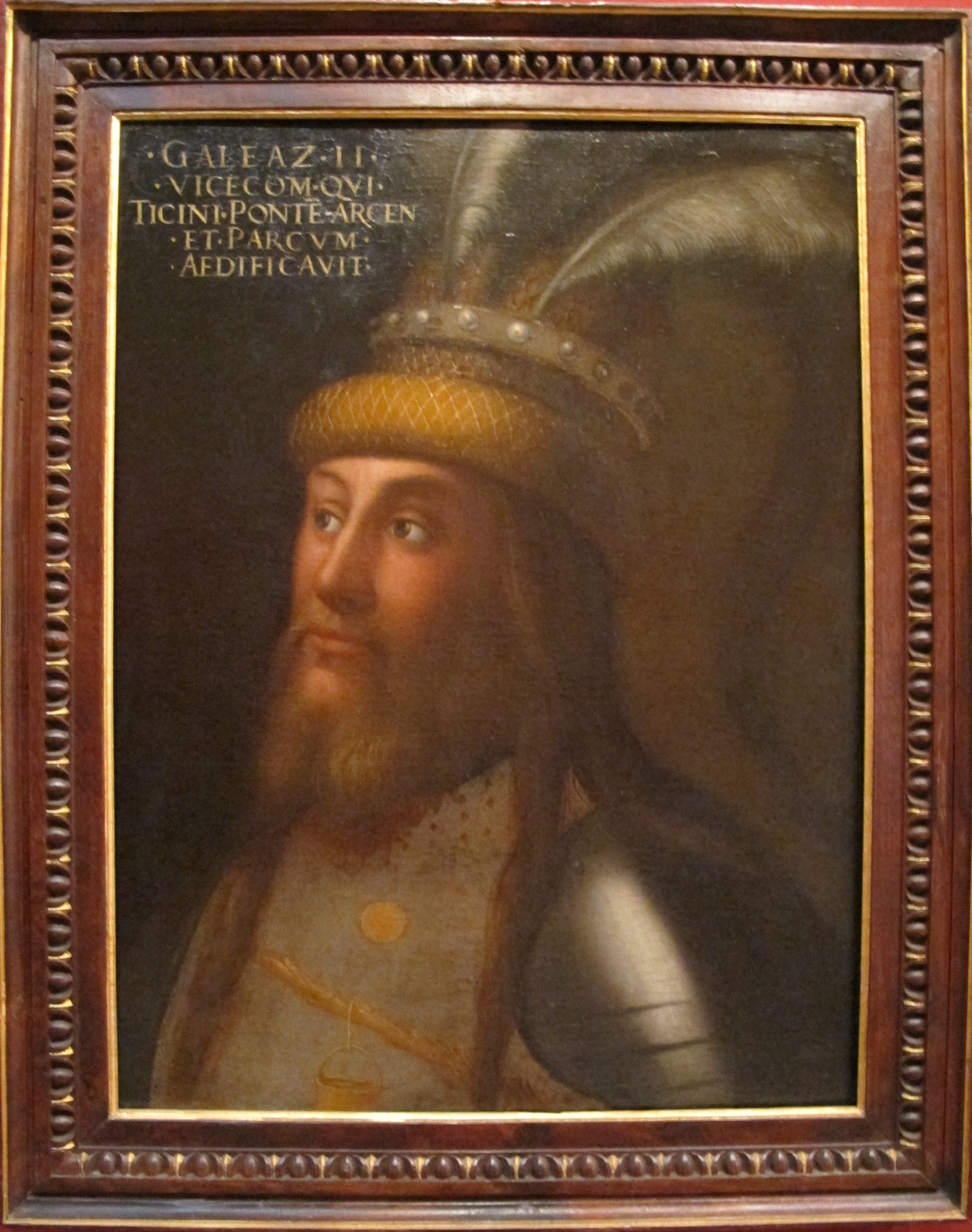 Cristofano dell'altissimo, galeazzo II visconti, 1556